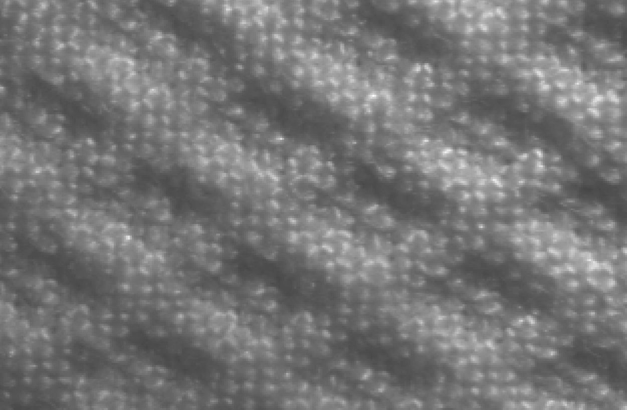 Piqué Doppelgewebe Baumwolle, 1 Würfel ist 3.65 mm breit, Mikroskopaufnahme einer Frackschleife